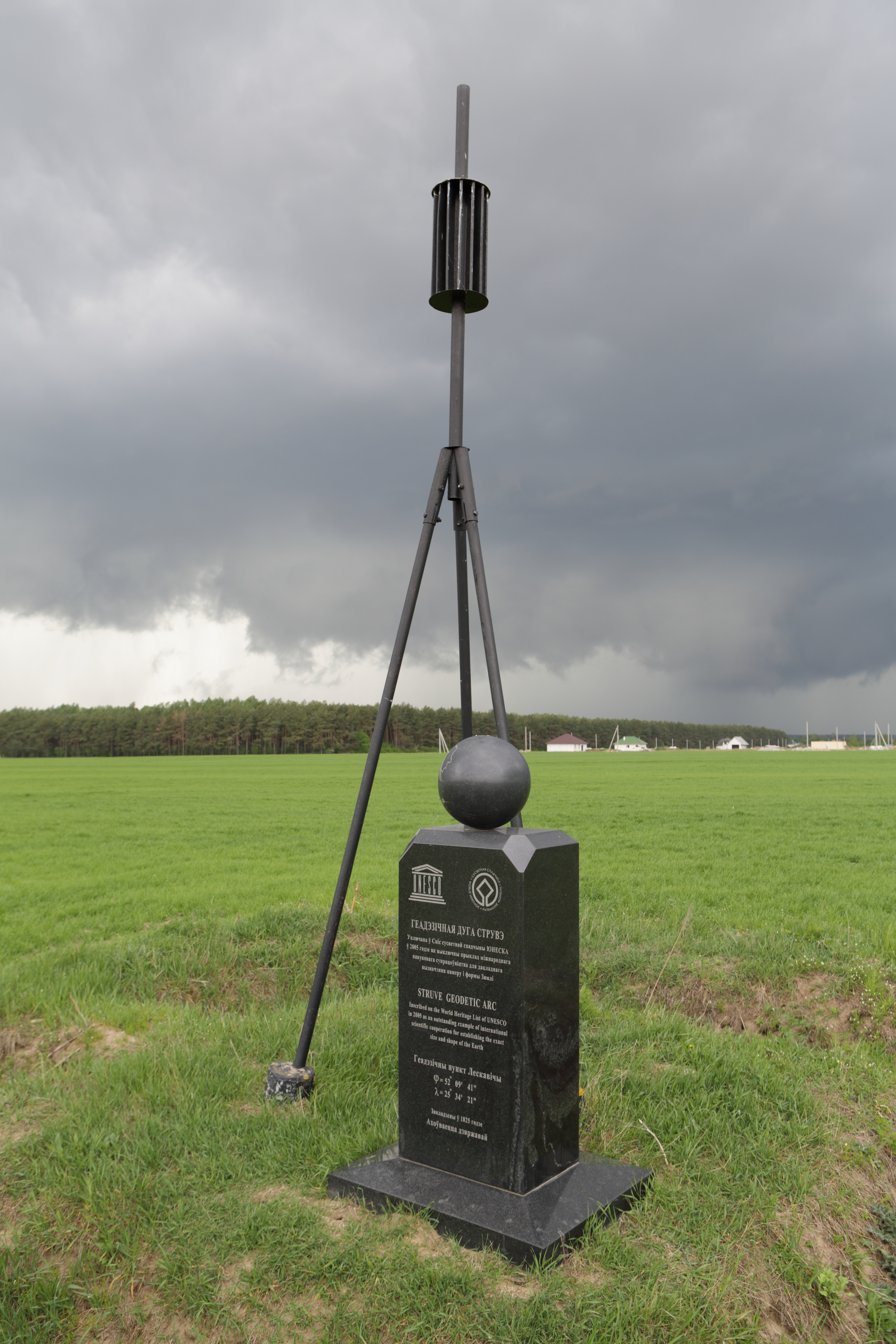 Struveho geodetický oblouk, památka UNESCO